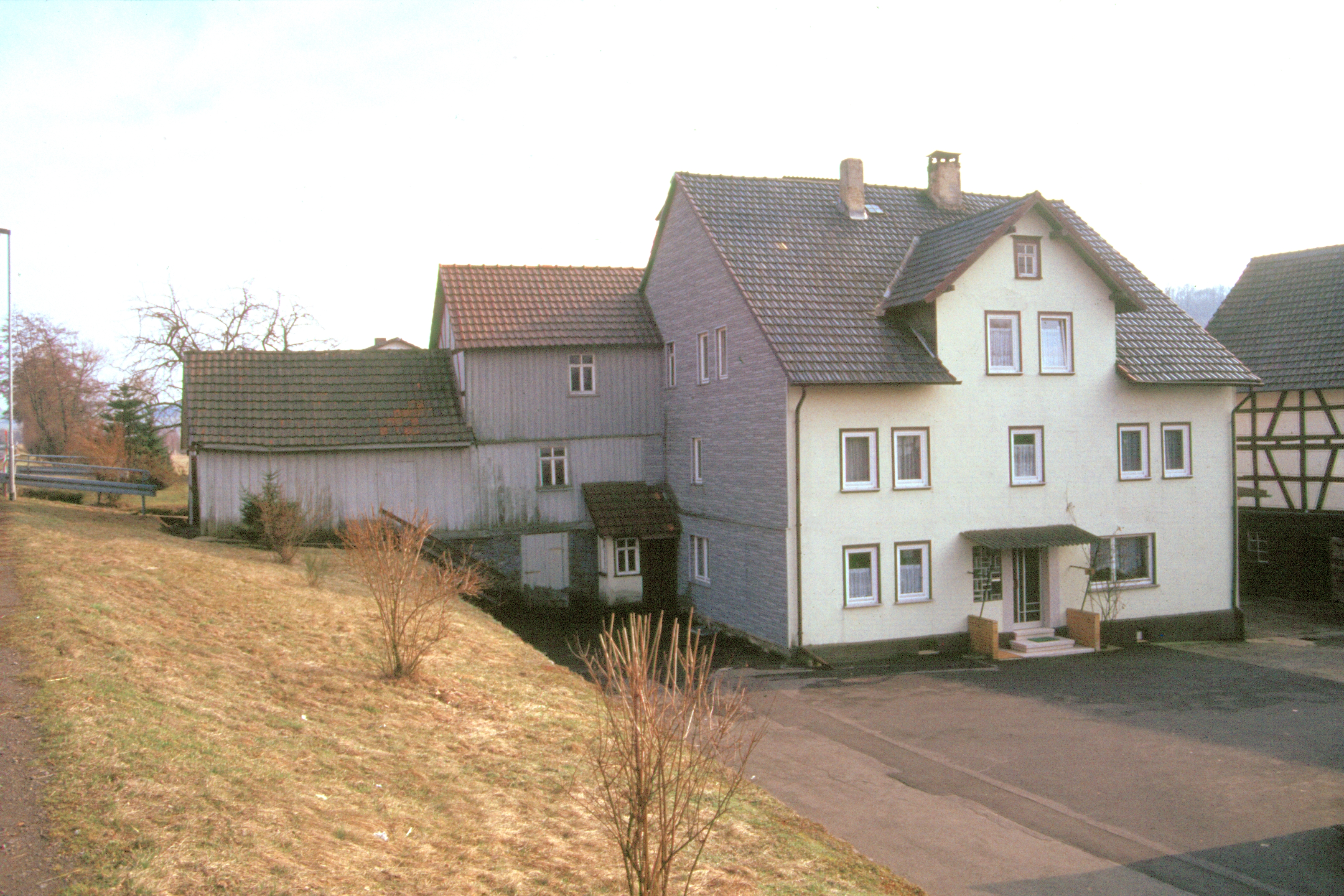 Obermühle Mücke Ruppertenrod